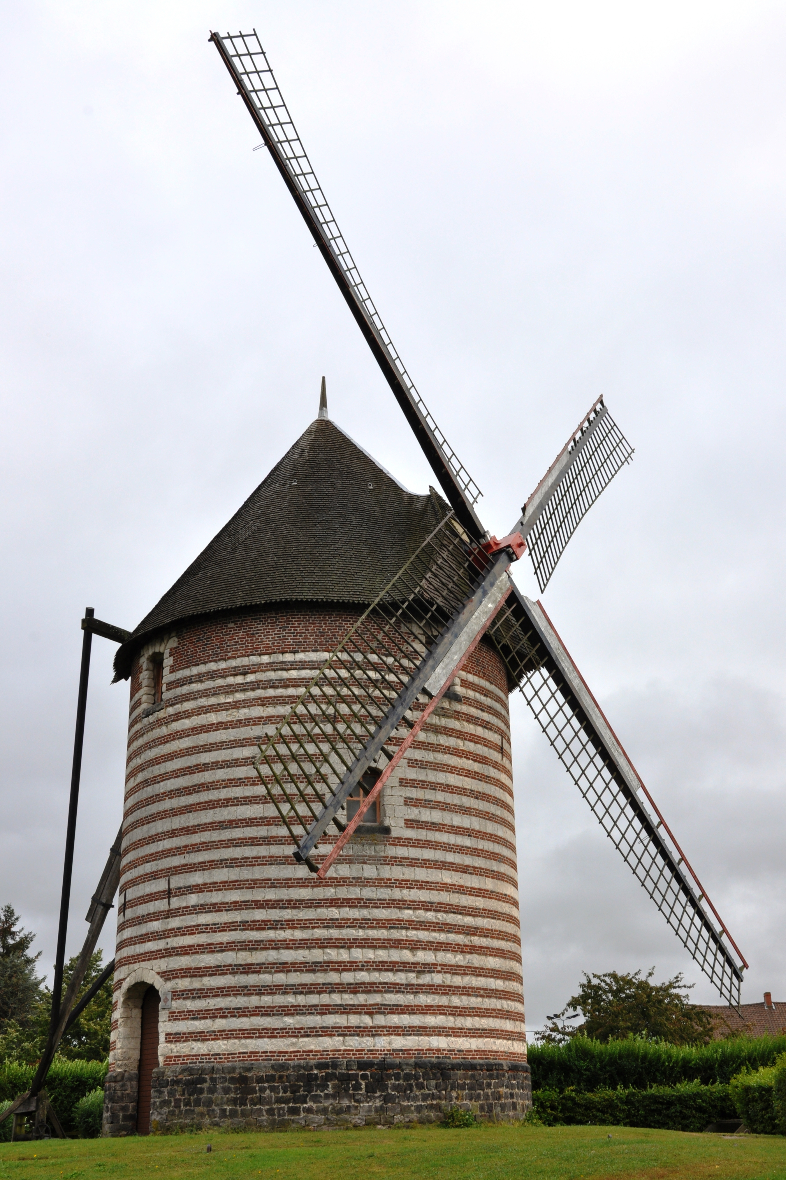 Moulin de Beuvry, Le BallonRoute Nationale (Inscrit, 1987) .